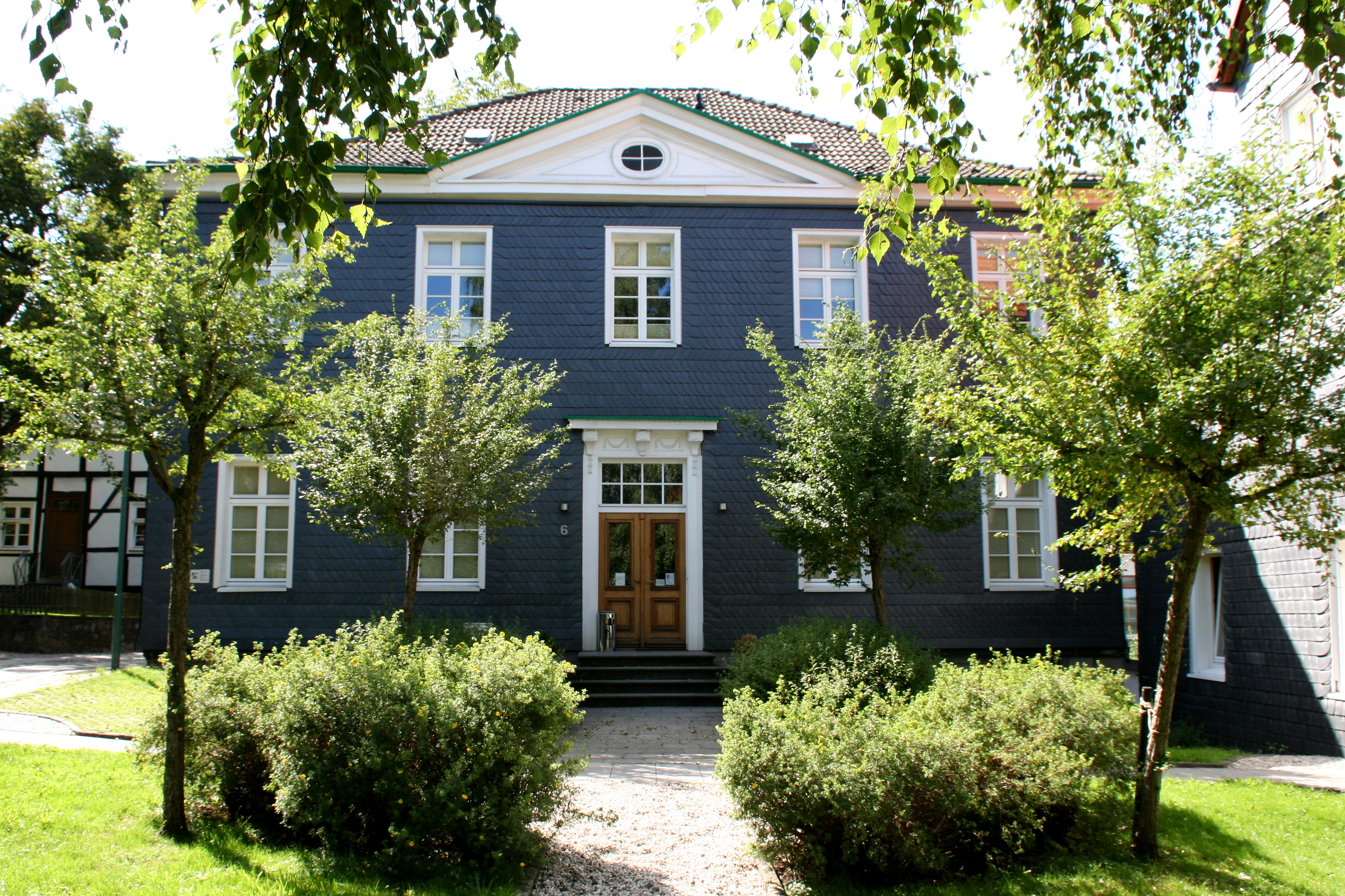 Neues Äbtissinnenhaus, Im Stift 6 in Gevelsberg